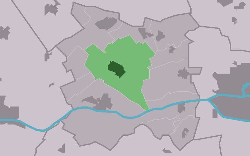 Kaartsje fan himrik fan Menaam